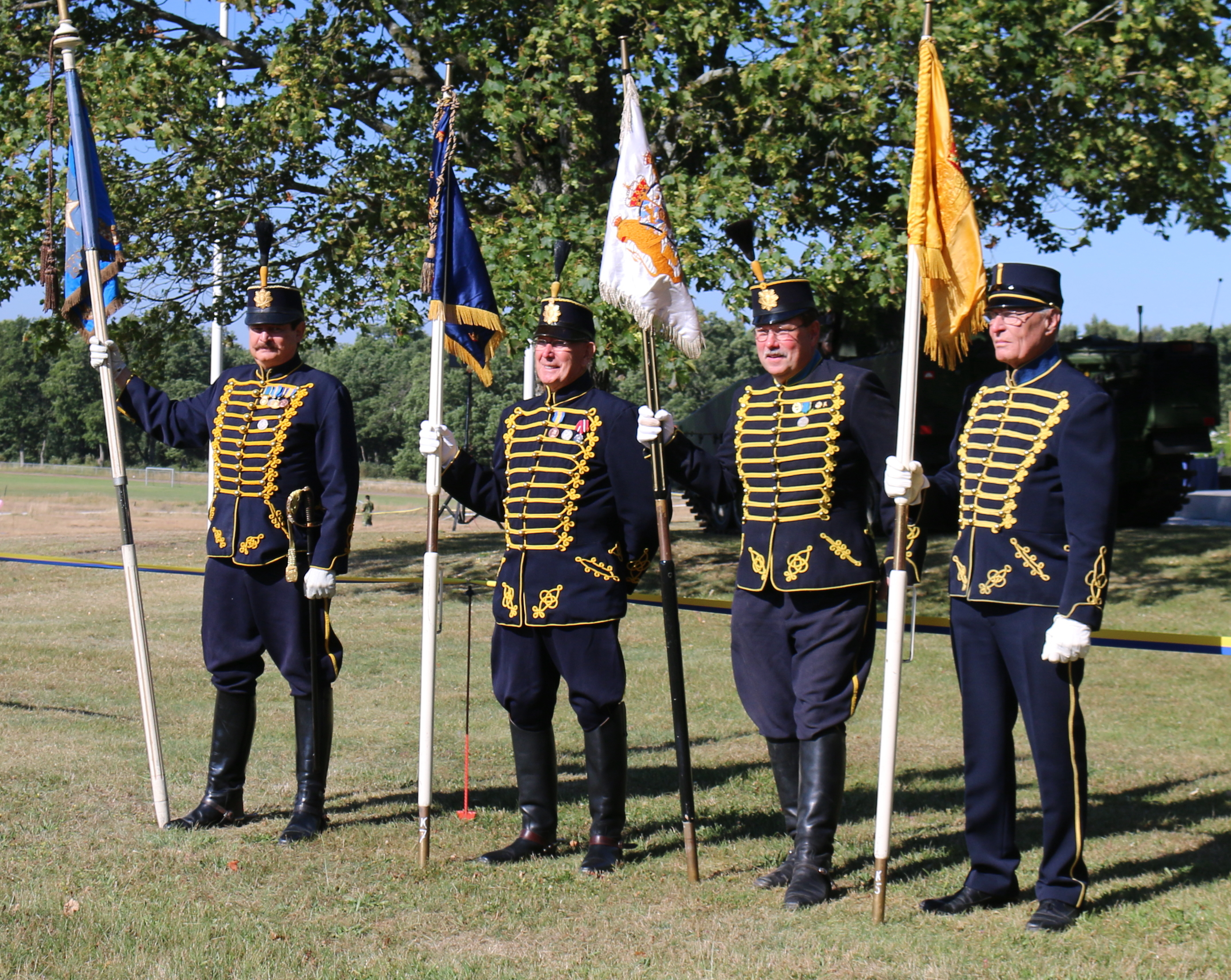 Husaruniform modell 1895